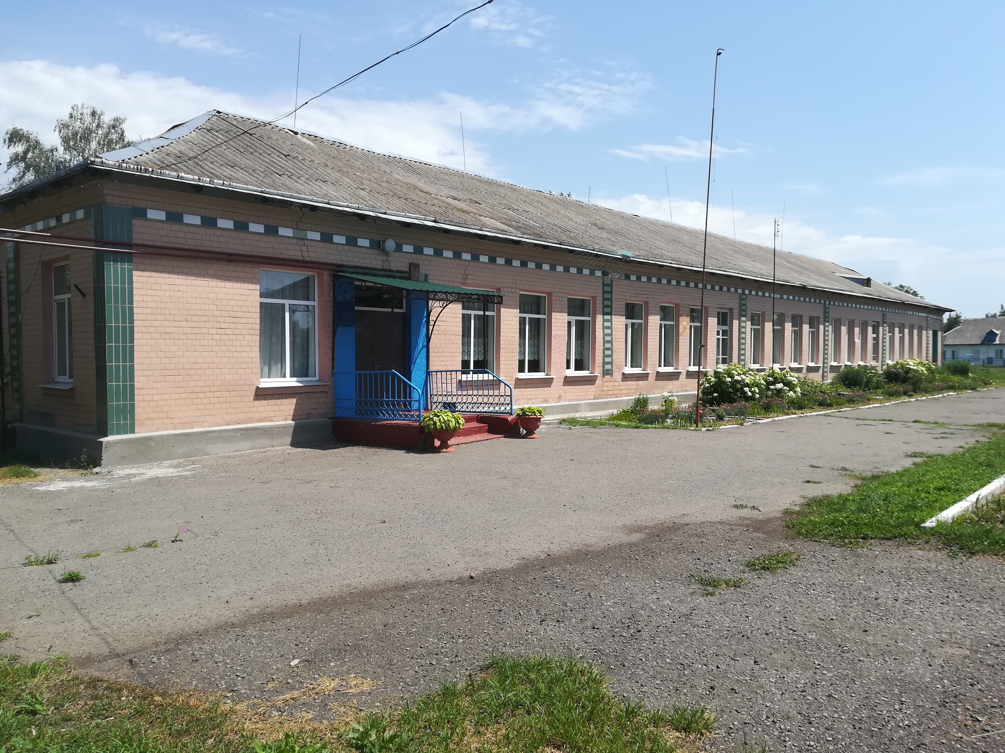 Школа в селі Нове життя